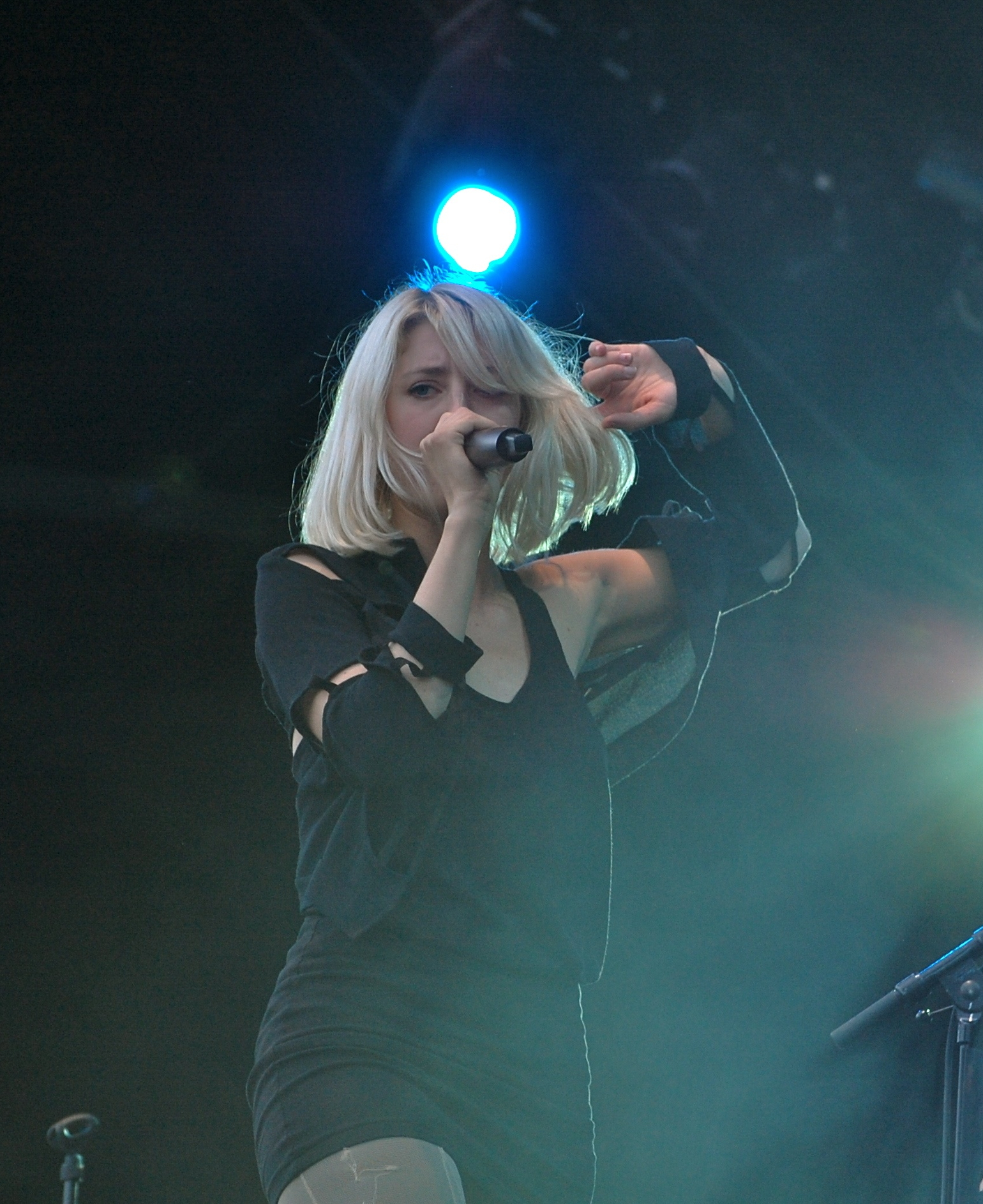 Veronica Maggio uppträder på Putte i parken i Karlskoga i juli 2011.